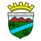 Logo da cidade de Mário Campos - MG